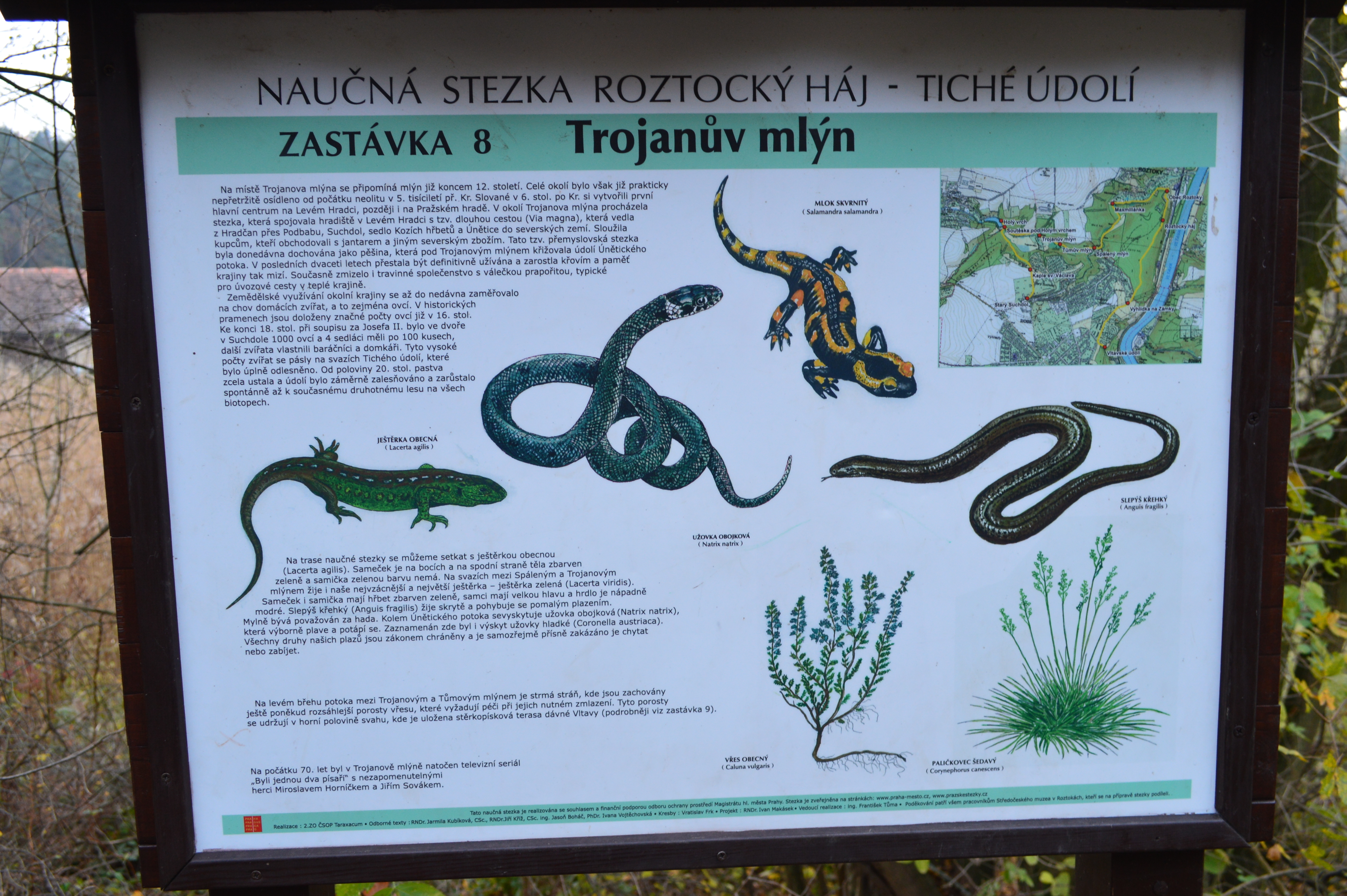 Informační tabule s vyskytující se flórou a faunou